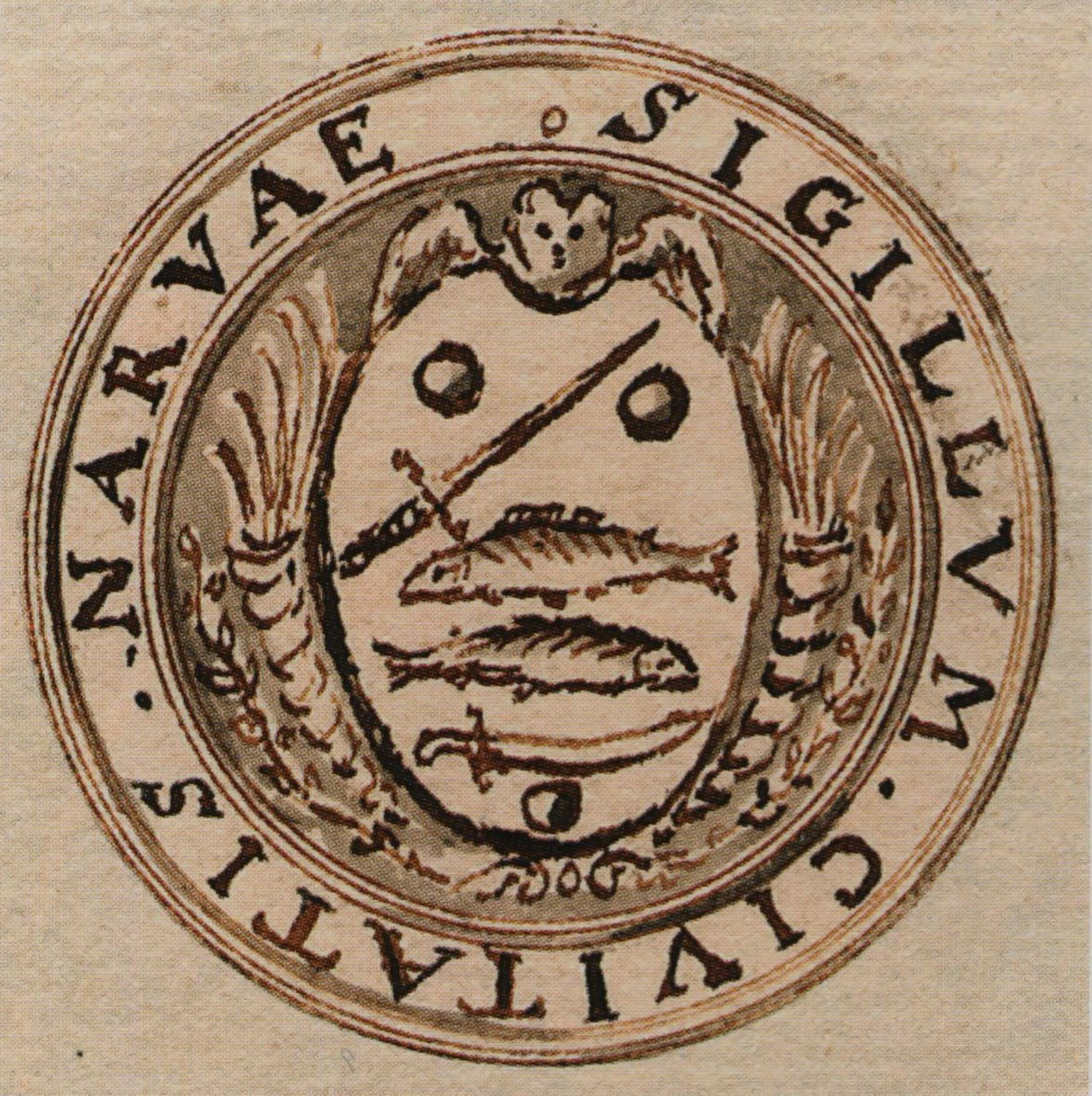 Narva vapipitsat